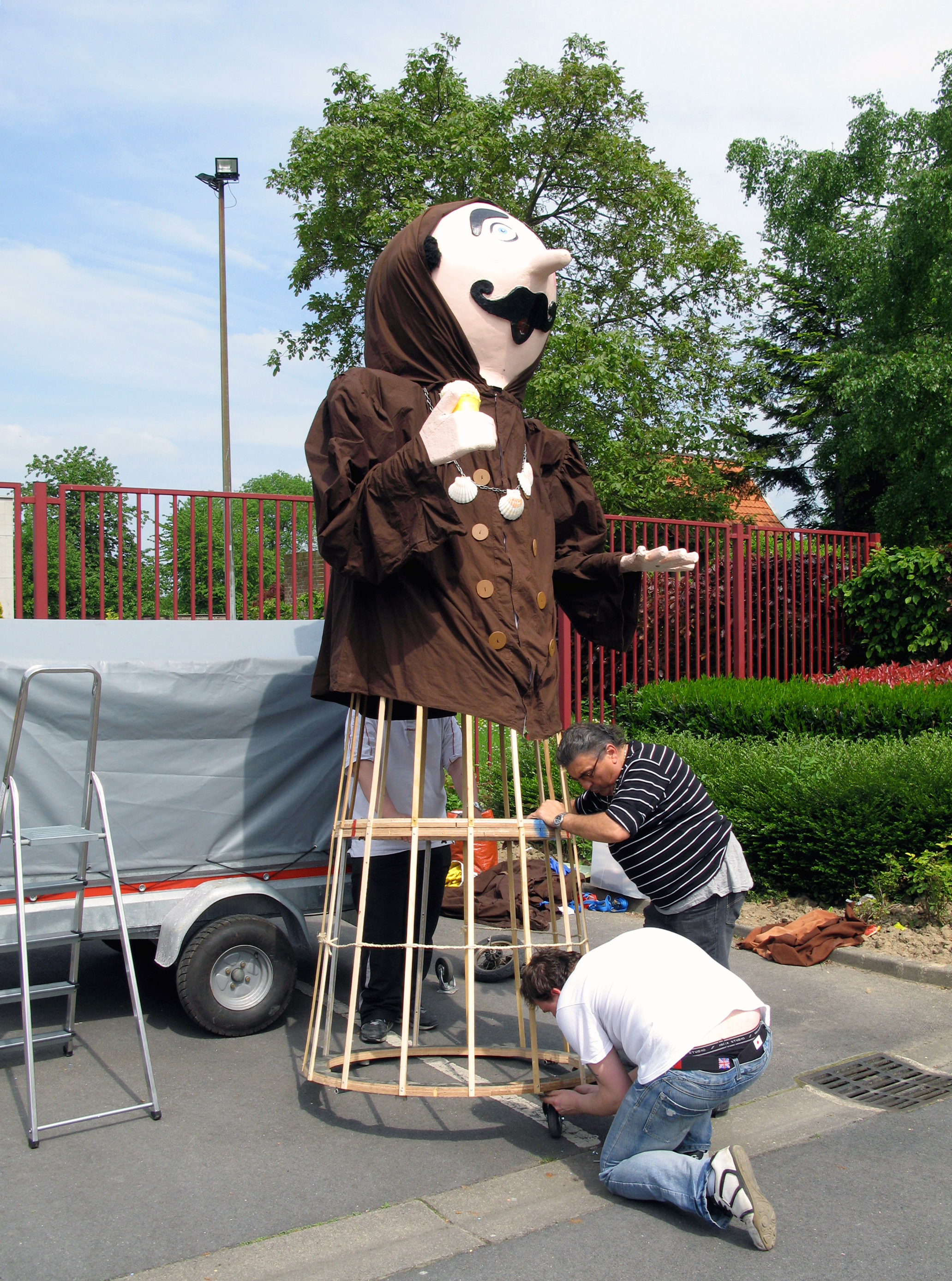 Guesnain (Nord, France) - Animation festive au centre-ville, un dimanche de printemps. A proximité immédiate de la Mairie, le géant « Frère Jacques » est en cours d'assemblage. Il est à noter que sa structure (son squelette) n'est pas de conception traditionnelle (à savoir en osier tressé). .